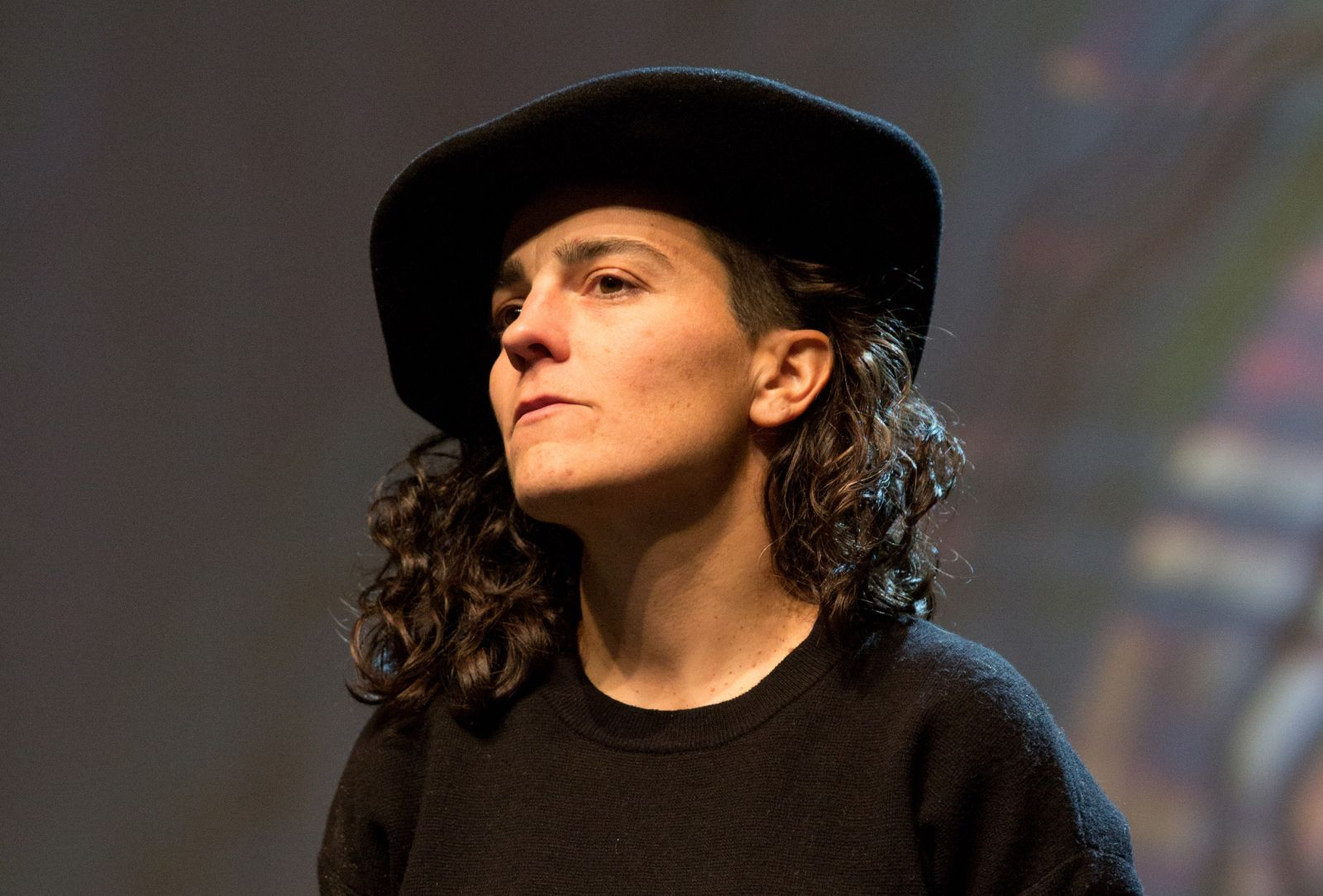 2017ko Bertsolari Txapelketa Nagusiko finalean Argiako Dani Blancok egindako argazkia.